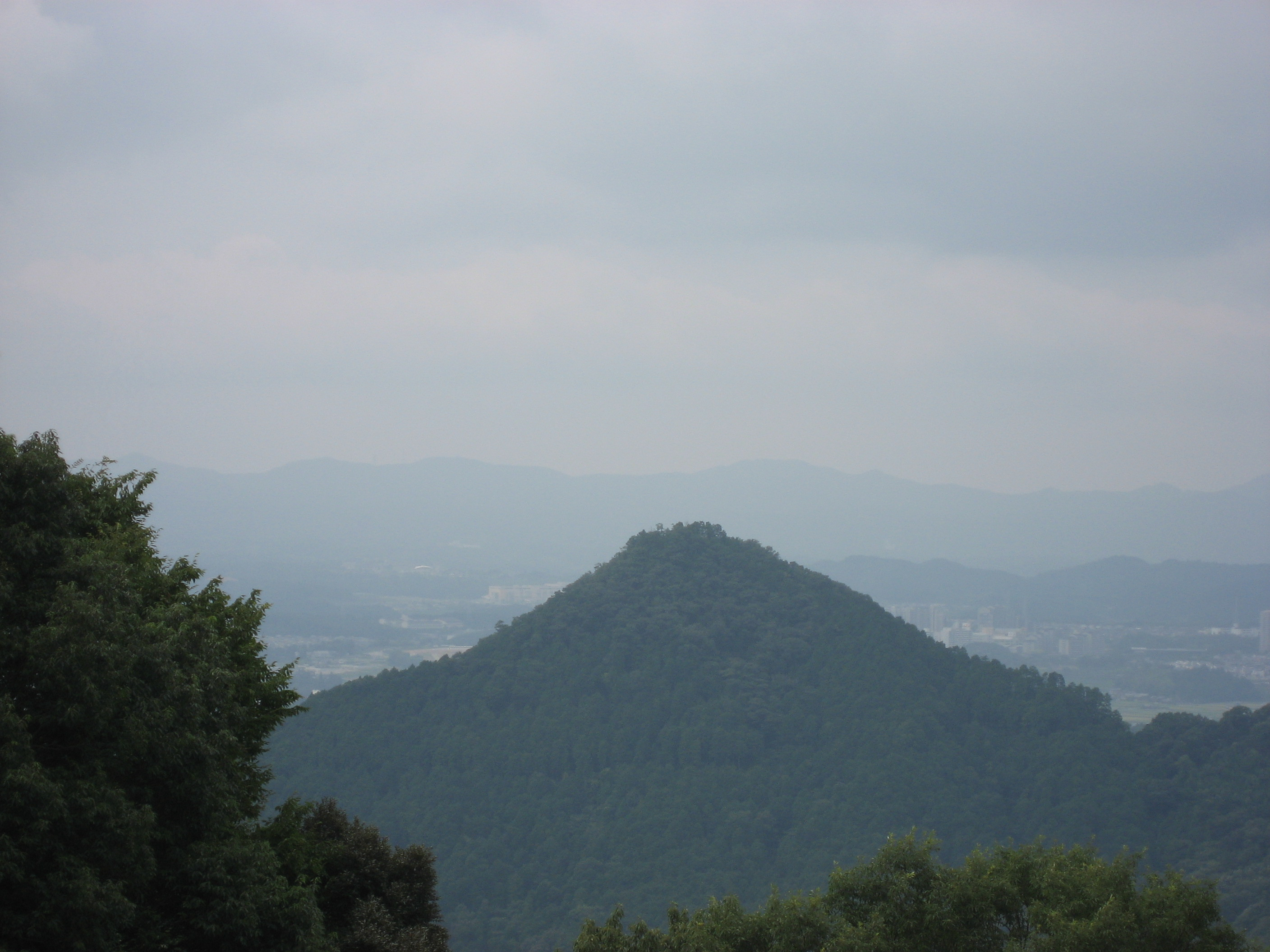 Bodai-ji Temple, Sanda, Hyogo, Japan